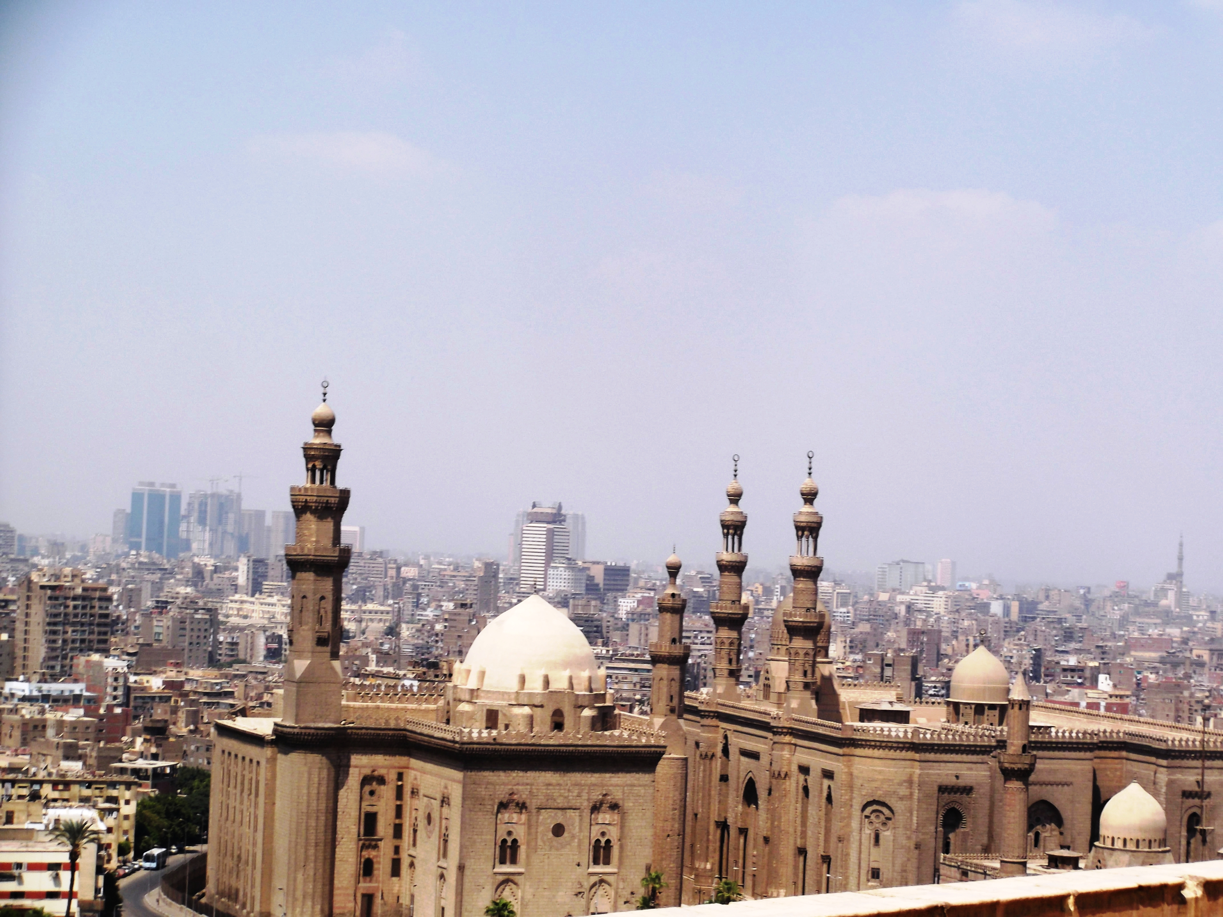 مسجدا الرفاعي والسلطان حسن بالقاهرة.